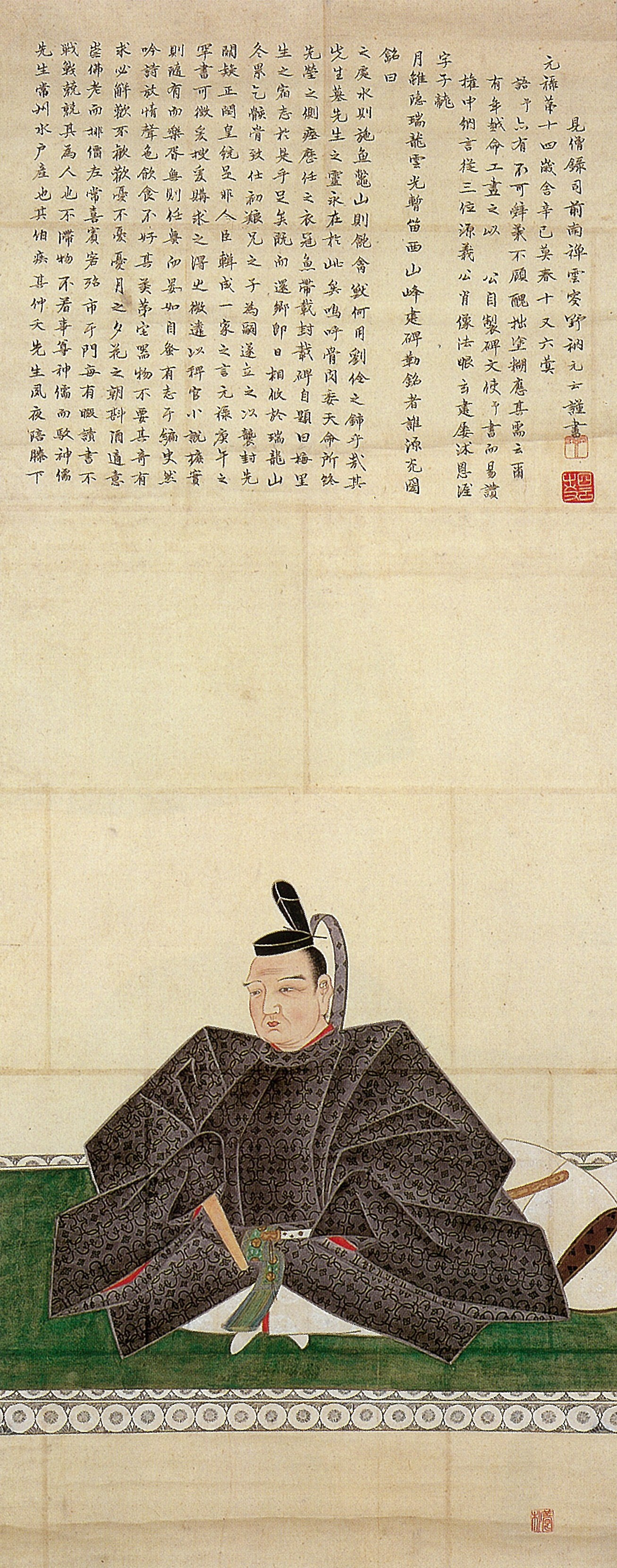 水戸徳川博物館所蔵の狩野常信筆による徳川光圀像。